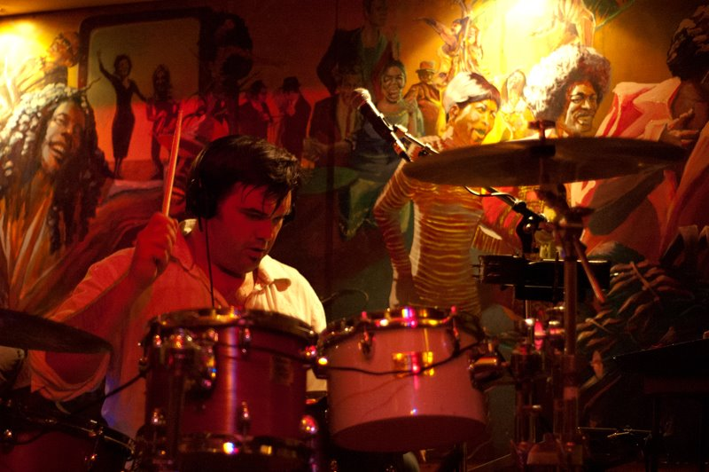 Red Cardell